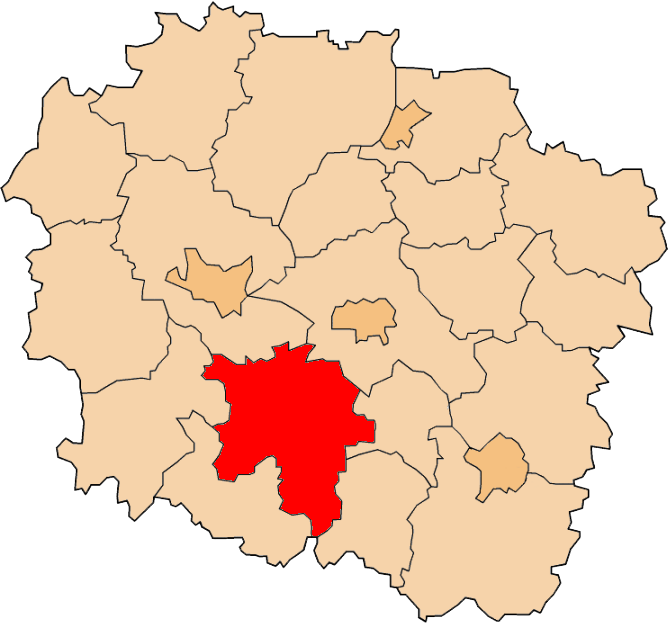 Powiat inowrocławski na mapie województwa kujawsko-pomorskiego.